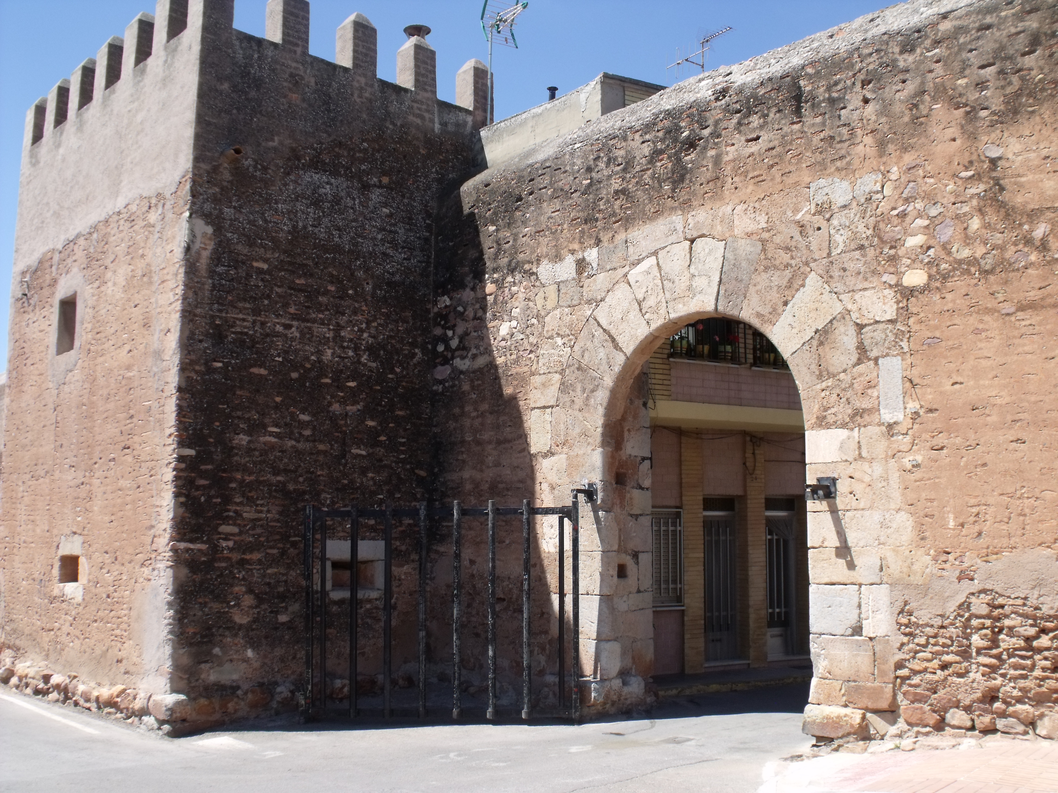 Mascarell